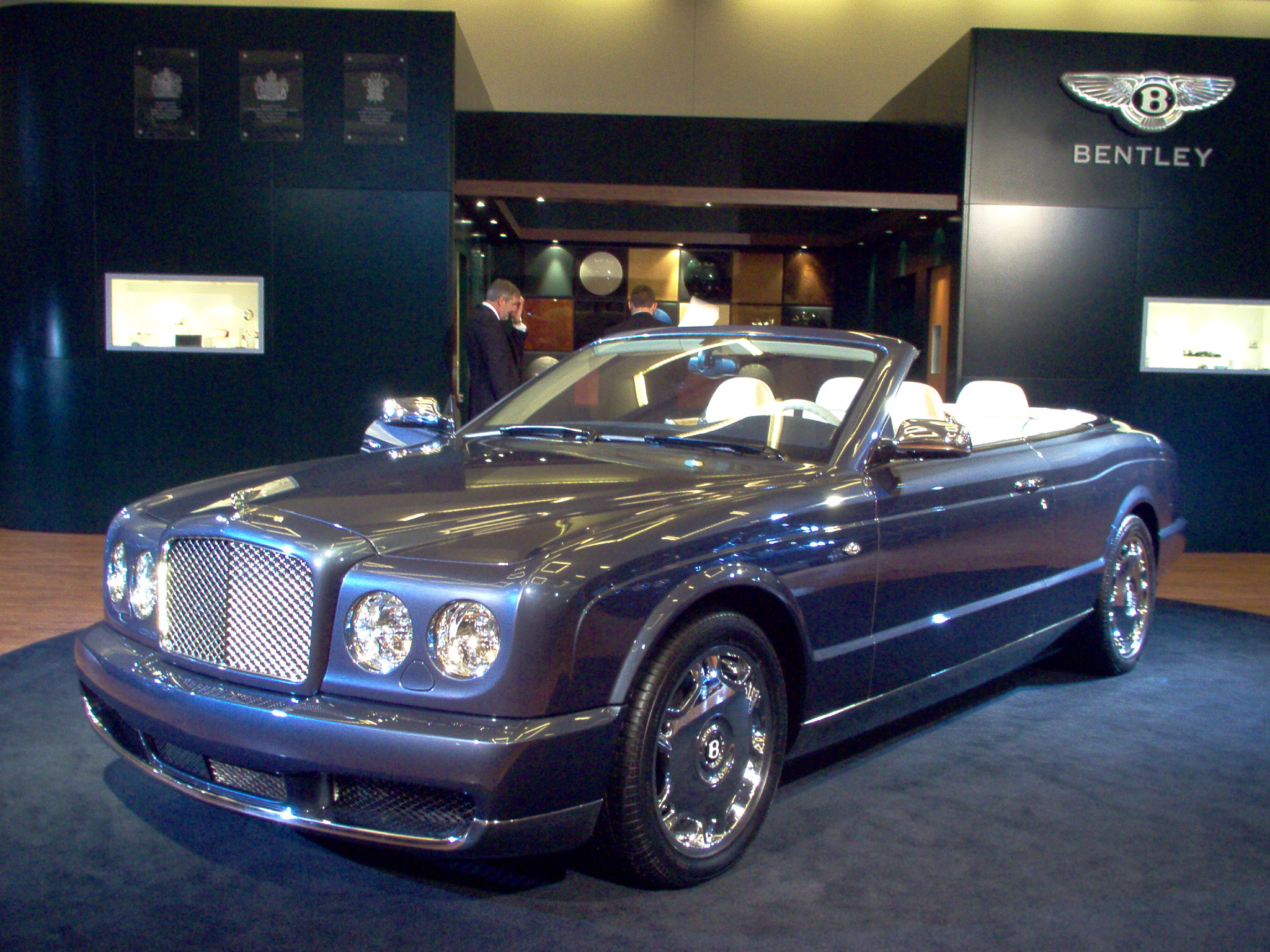 IM000882.JPG